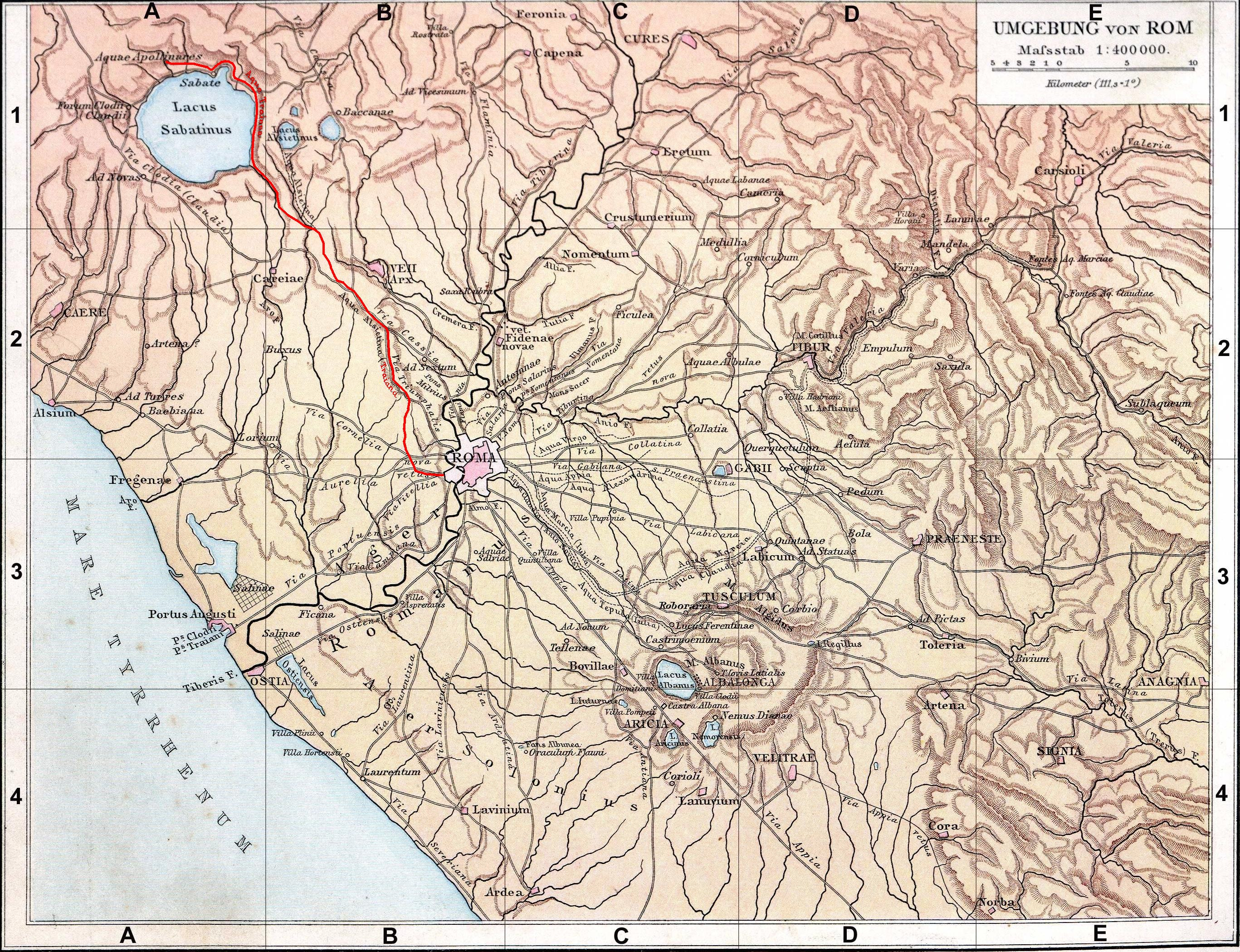 Fond de carte de 1886 (G. Droysens Allgemeiner Historischer Handatlas), libre de droit (Image:Rom_Umgebung.jpg), avec l'aqua Traiana en rouge.